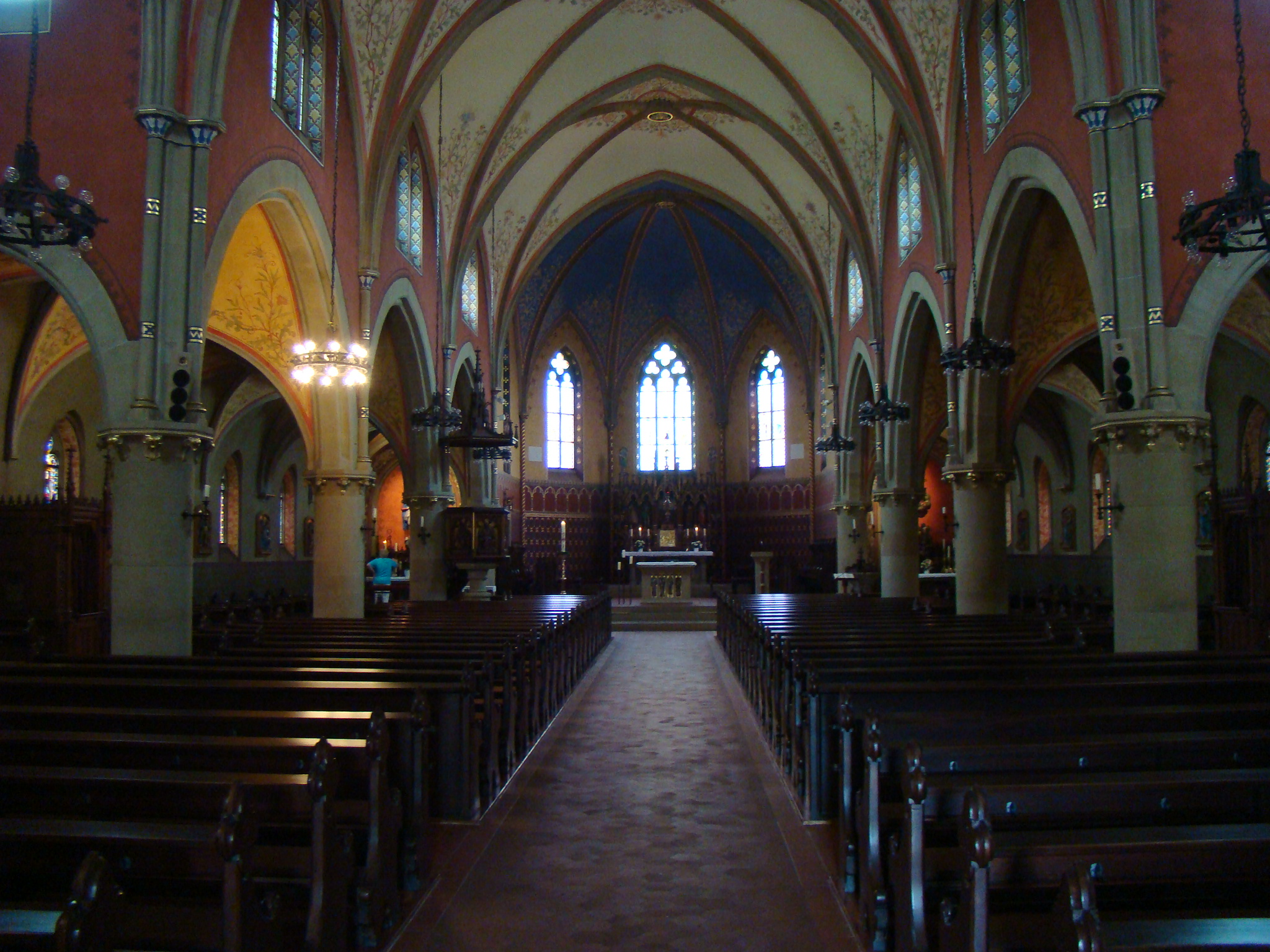 St. Marcellus, Stettfeld, Innenansicht